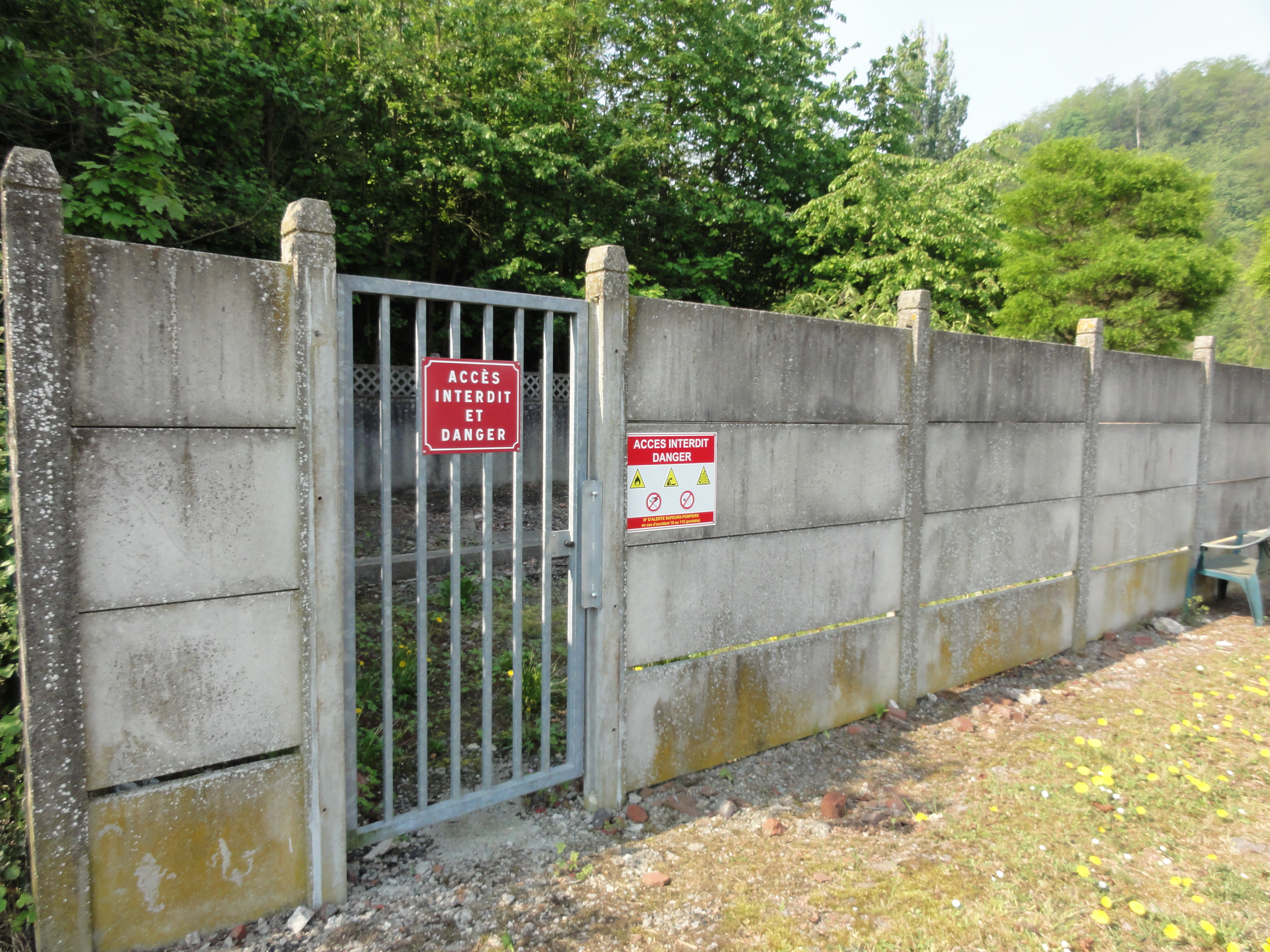 La Fosse Bleuse Borne de la Compagnie des mines d'Anzin était un charbonnage constitué d'un seul puits situé à Anzin, Nord, Nord-Pas-de-Calais, France.